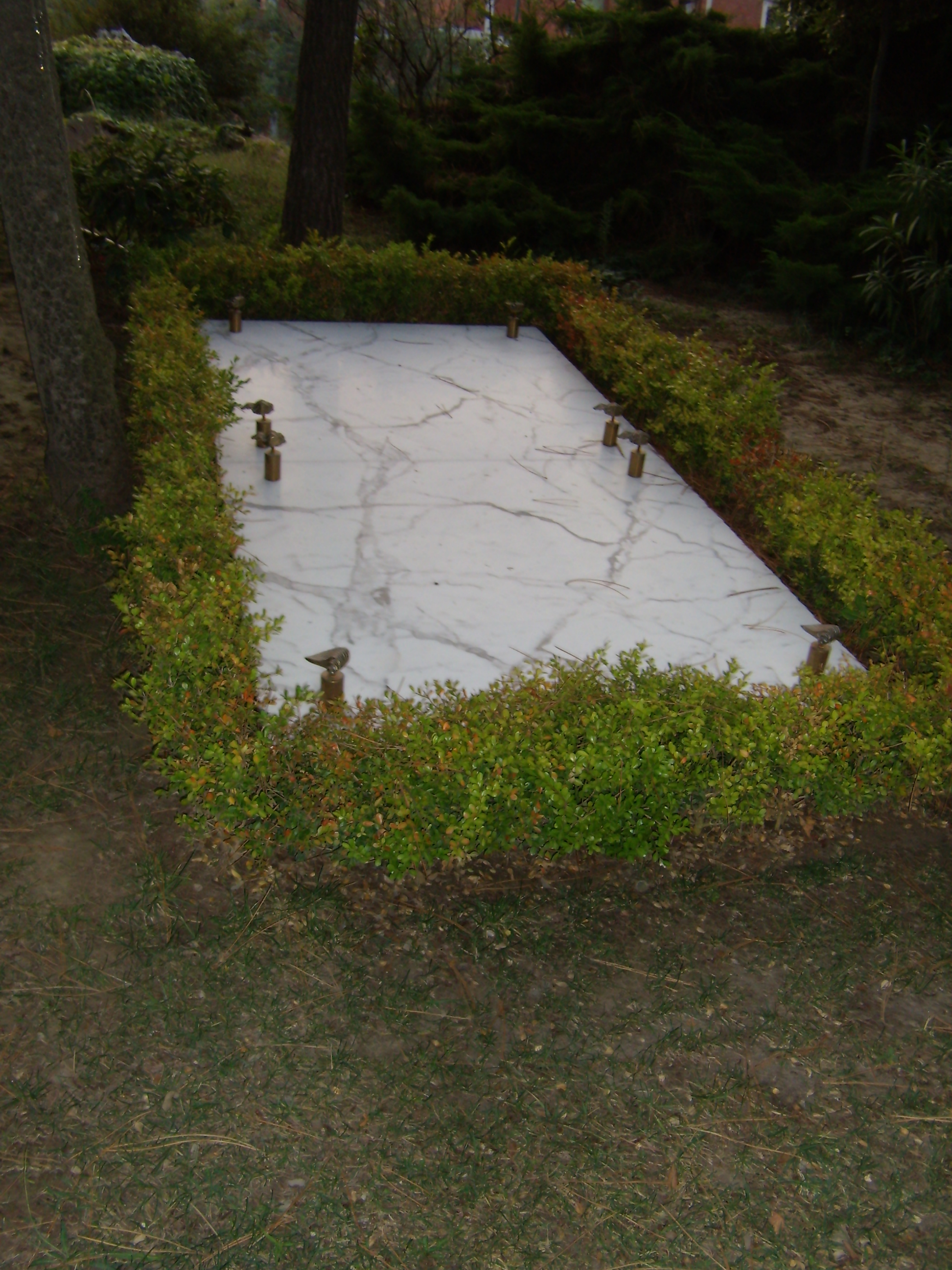 La tomba di Remo Brindisi nel giardino della sua casa-museo al Lido di Spina (FE)